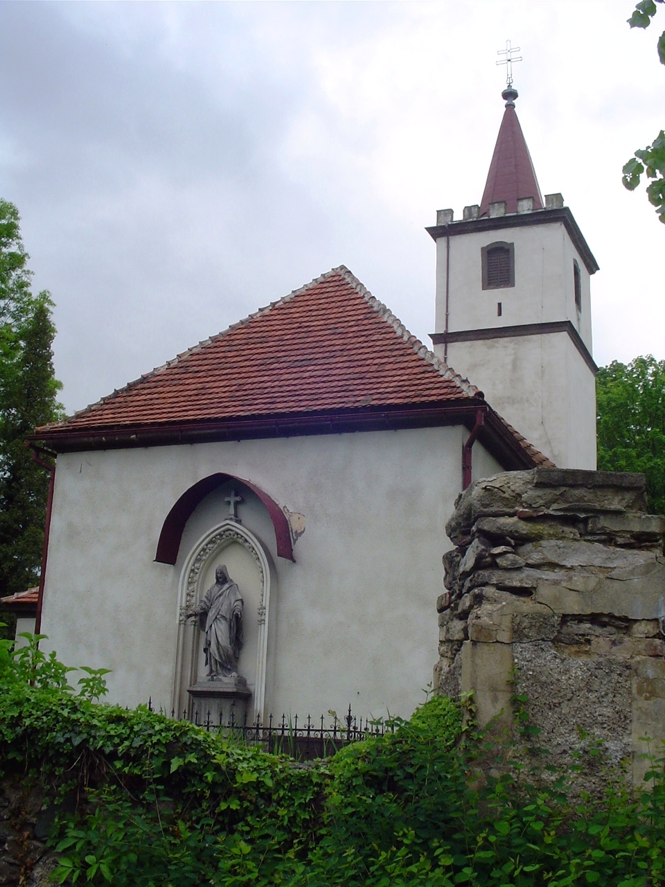 Stare Rochowice - kościół parafialny p.w. św. Jana Chrzciciela, XV-XVIII (zabytek nr rejestr. A/1972/826 z 23.12.1960)